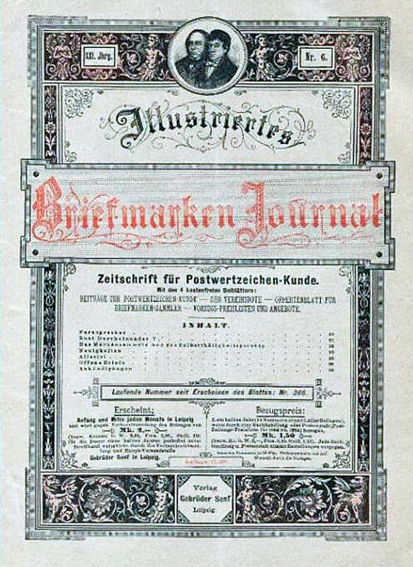 Eine Ausgabe des Illustrierten Briefmarken-Journals von 1894